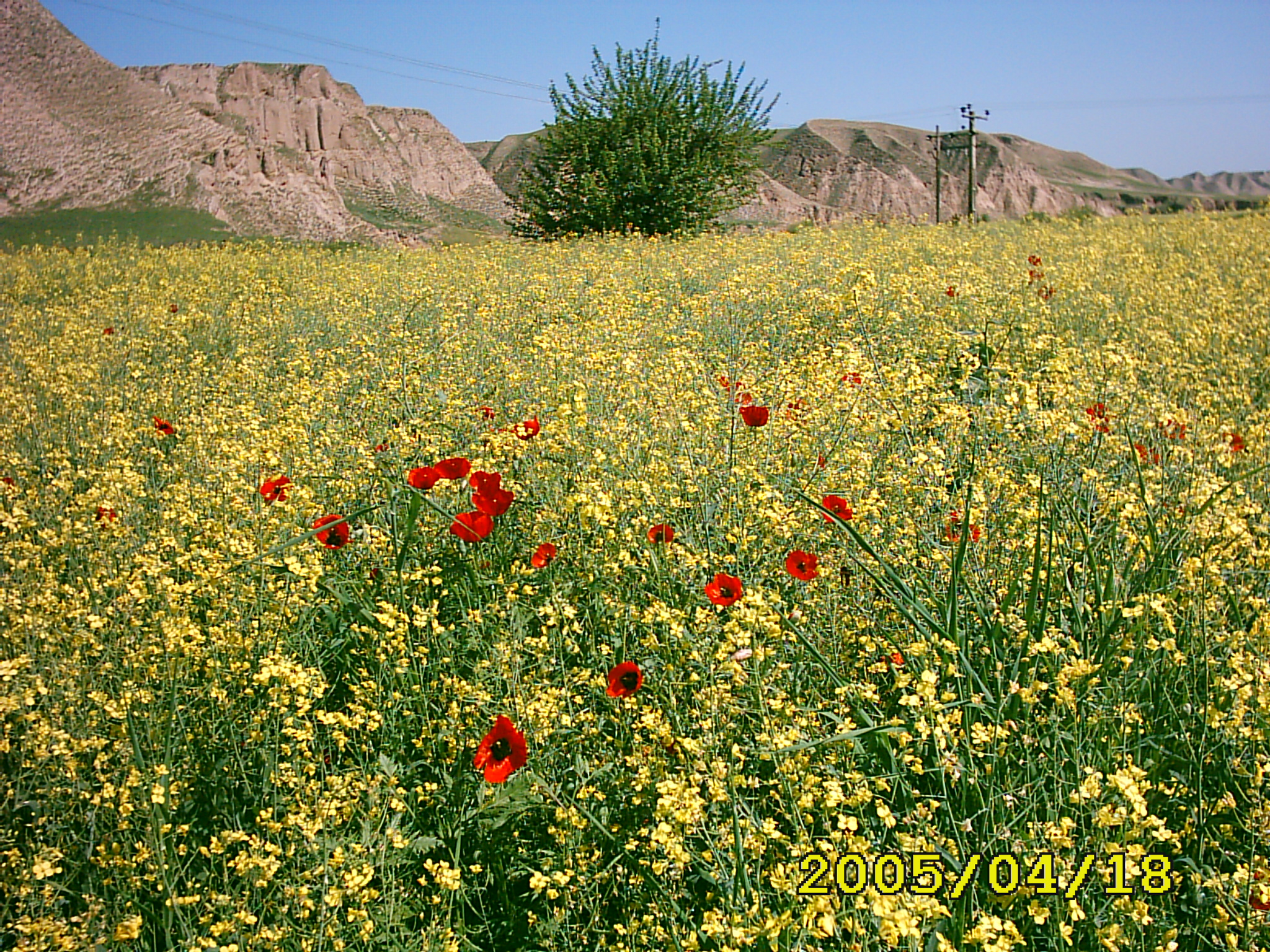 چند شقایق در مزرعه کلزا - کلاله، گلستان، ایران